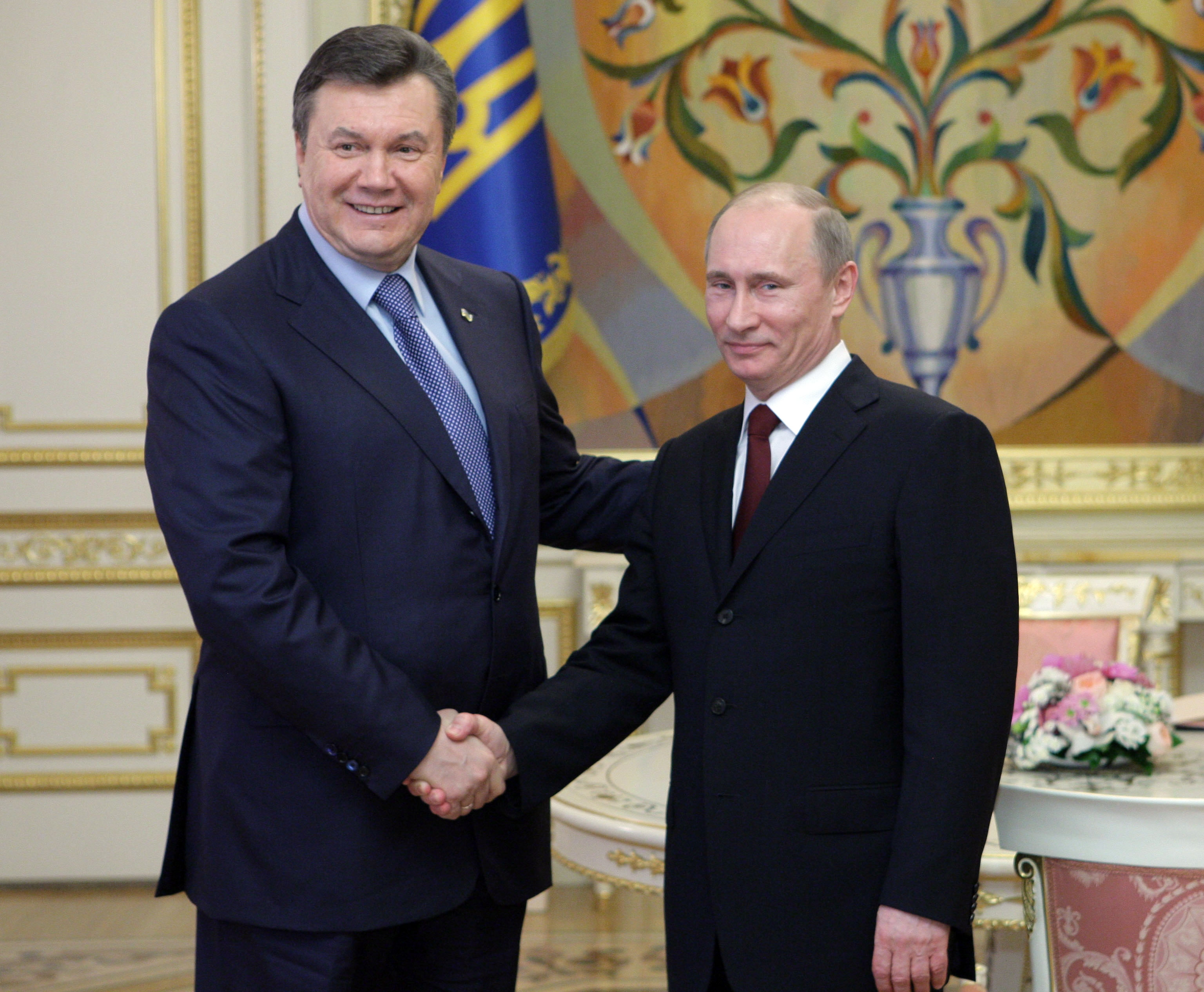 Председатель Правительства Российской Федерации В.В.Путин встретился с Президентом Украины В.Ф.Януковичем